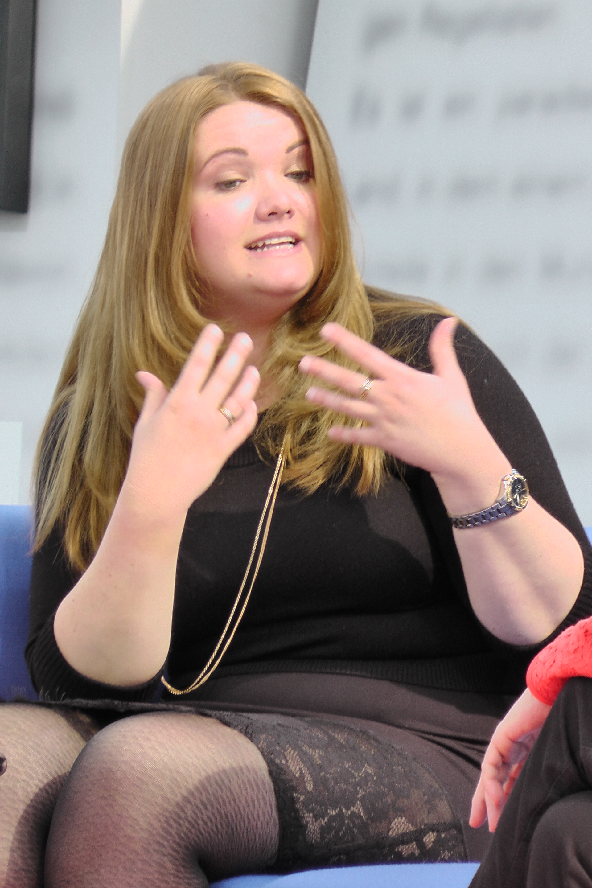 Dieses Fotos dürfen Sie honorarfrei nutzen, wenn Sie folgenden credit beachten: Copyright: Das blaue Sofa / Club Bertelsmann. Obreht, Téa: Die Tigerfrau Rowohlt Verlag | Moderation: Barbara Wahlster Natalia, die in einem Waisenhaus in Südosteuropa arbeitet, erfährt vom rätselhaften Tod ihres Großvaters. Nach Erklärungen suchend, erinnert sich die junge Ärztin an Geschichten, die sich um zwei seltsame, fatale Gestalten drehen – die Tigerfrau, eine schöne Taubstumme in seinem Heimatdorf, und einen charmanten, obskuren Mann, der nicht sterben kann. Während Natalia auf den Spuren des Großvaters durch idyllische und kriegsverwüstete Landschaften reist, werden ihr diese Figuren immer gegenwärtiger. „Seit Zadie Smith debütierte kein junger Autor mit solcher Kraft und Eleganz.“ Time. Téa Obreht, geboren 1985 in Belgrad, lebt seit ihrem zwölften Lebensjahr in den USA. Dort veröffentlichte sie erste Erzählungen u.a. im New Yorker, in Harper's und der New York Times. Im Sommer 2011 erhielt Téa Obreht den angesehenen Orange Prize for Fiction.